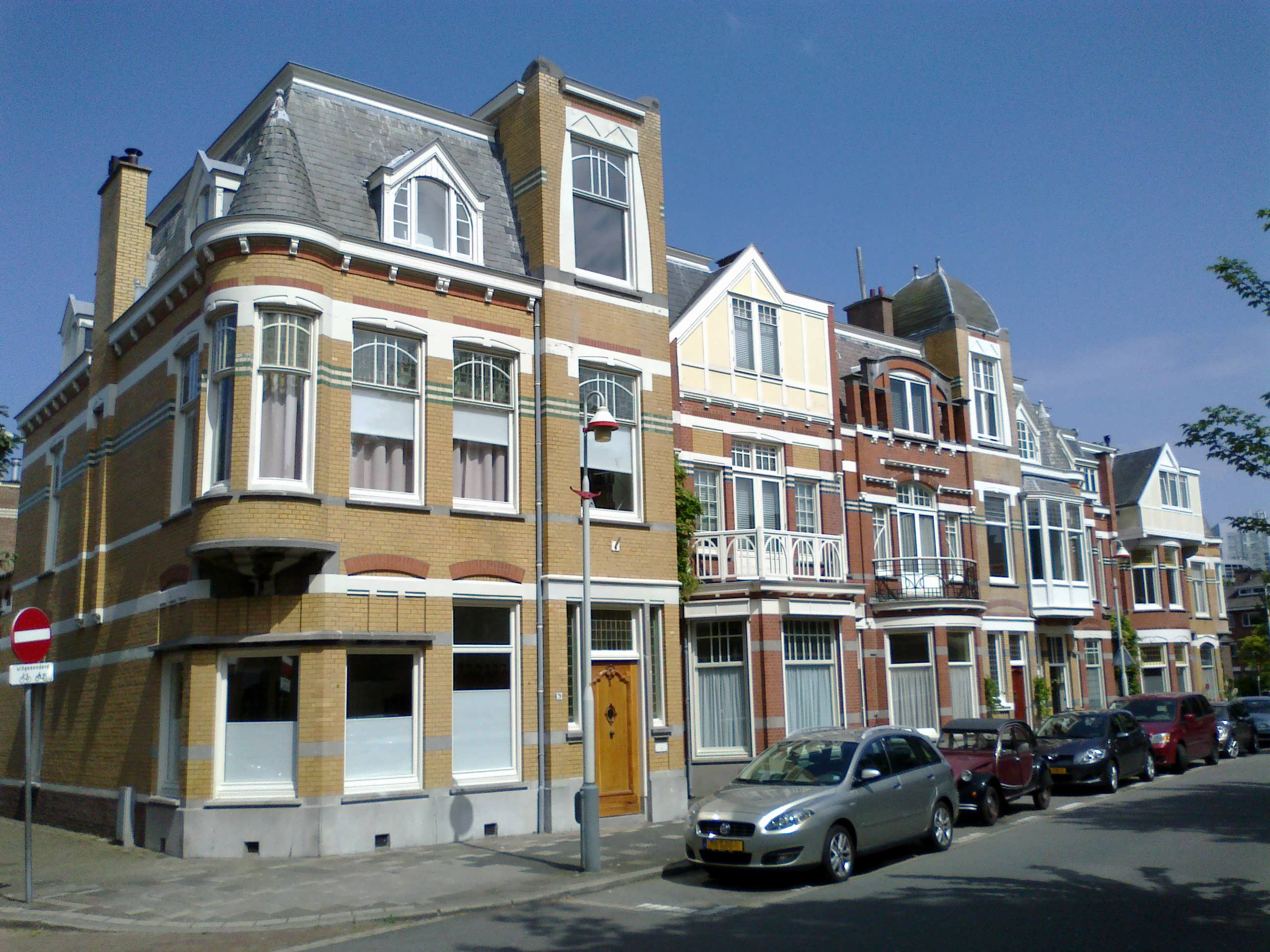 Huizen aan de Prins Mauritslaan (rechts) bij de van Hoornbeekstraat (links) in het Haagse Statenkwartier